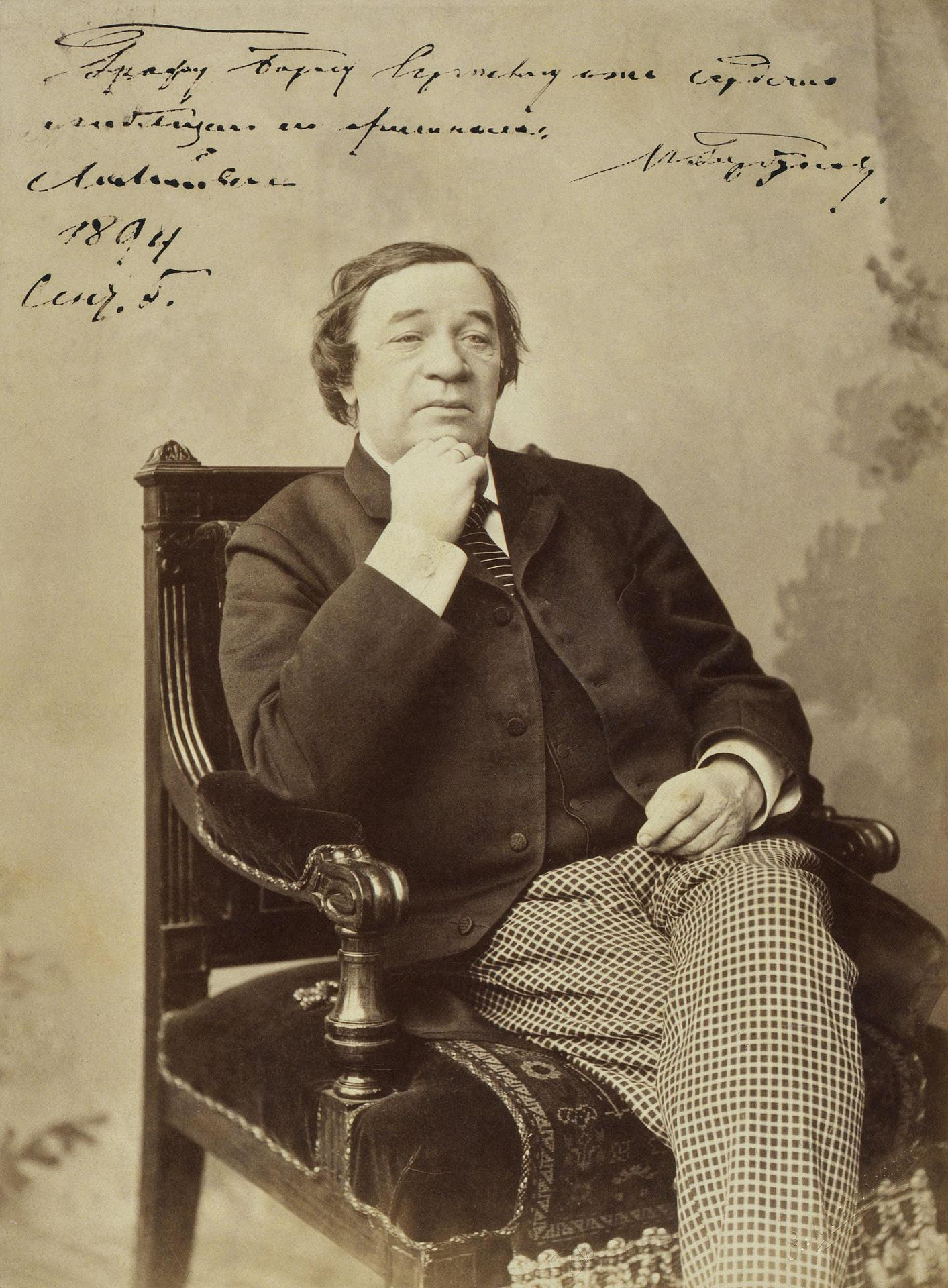 Портрет актёра Ивана Федоровича Горбунова. Фотография: альбуминовый отпечаток. 23х16,5 см